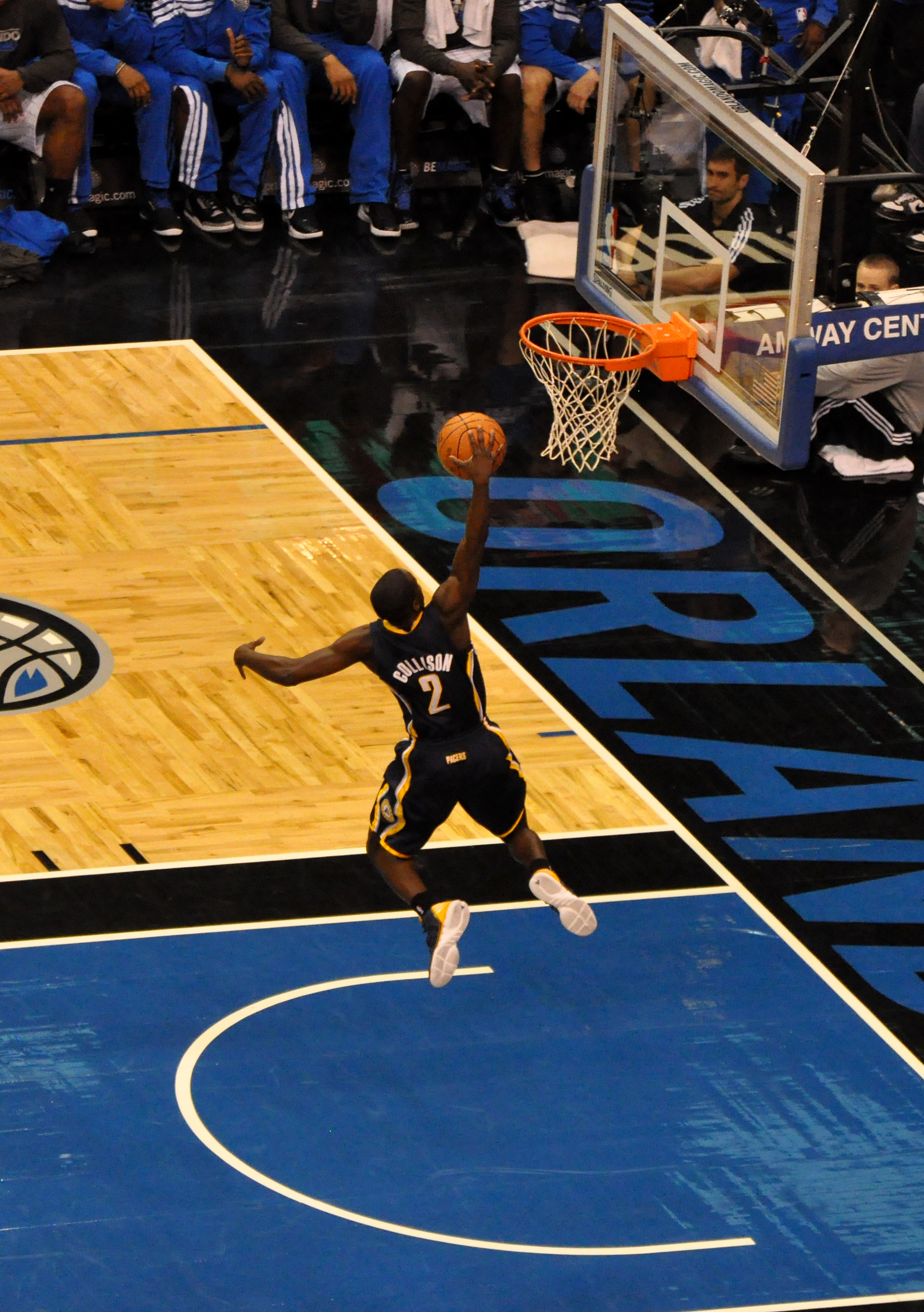 Darren Collison performs dunk